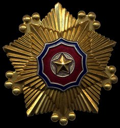 Order of the National Flag - 1st Class